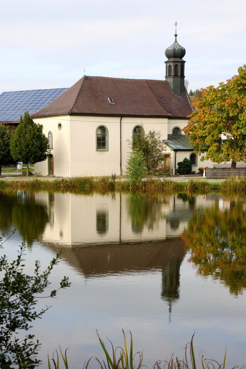 Expositurkirche (St. Sebastian) Archäologische Befunde und Funde im Bereich der Kath. Expositurkirche St. Sebastian in Hofenstetten, darunter die Spuren eines Vorgängerbaus.This is a photograph of an architectural monument.